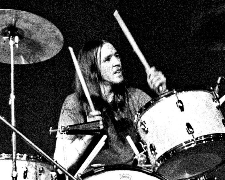 Rory Gallagher mit Gerry McAvoy (bs) und Rod de'Ath (dr), März 1973 , Musikhalle Hamburg